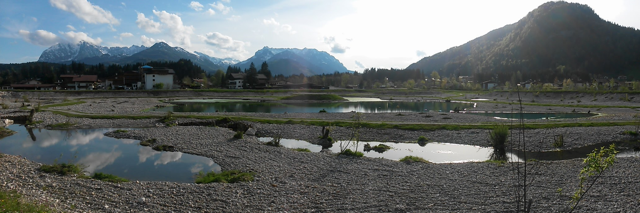 Rückhaltebecken - Hochwasserschutz in Kössen